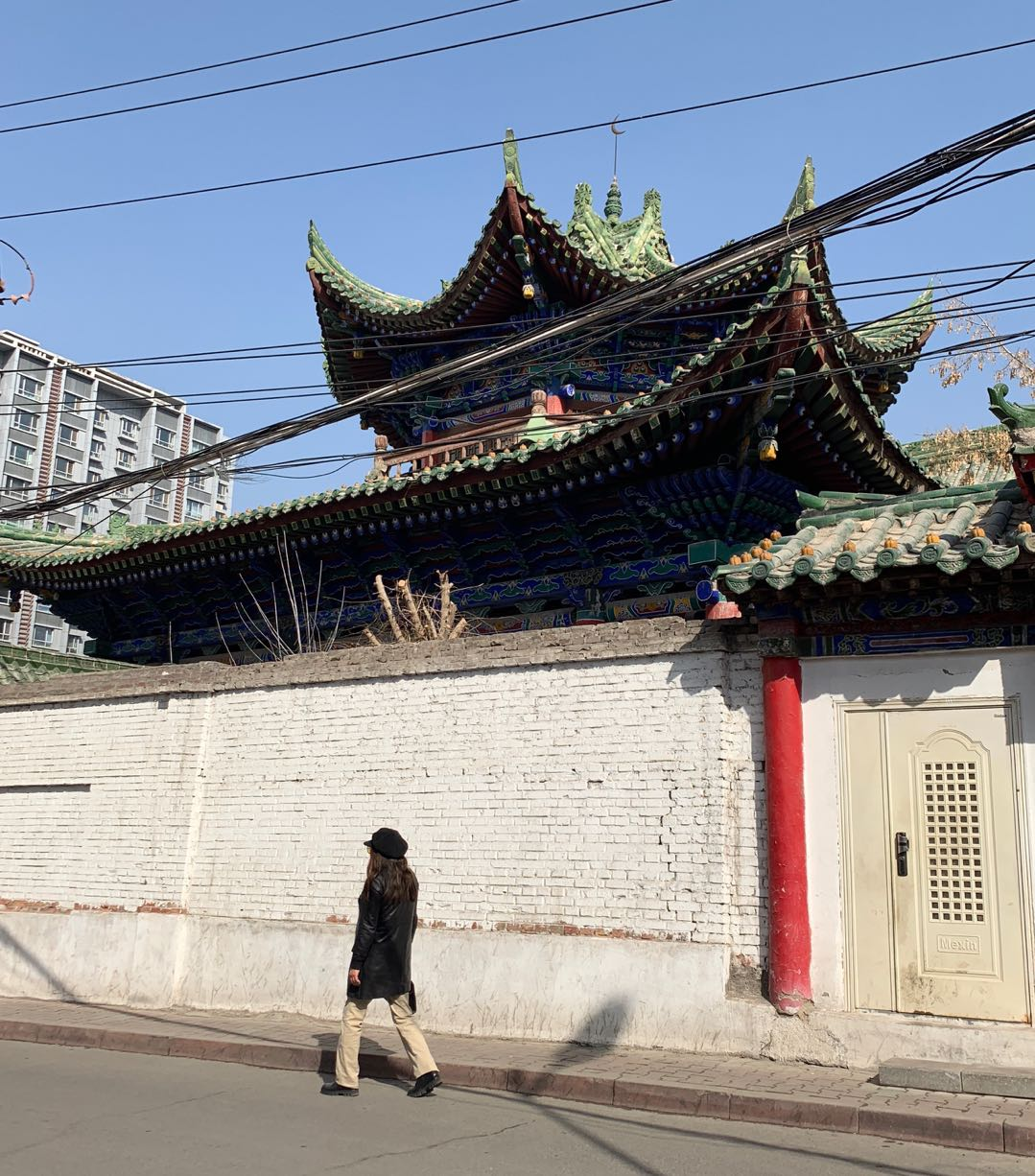 中文（中国大陆）: 乌鲁木齐陕西大寺